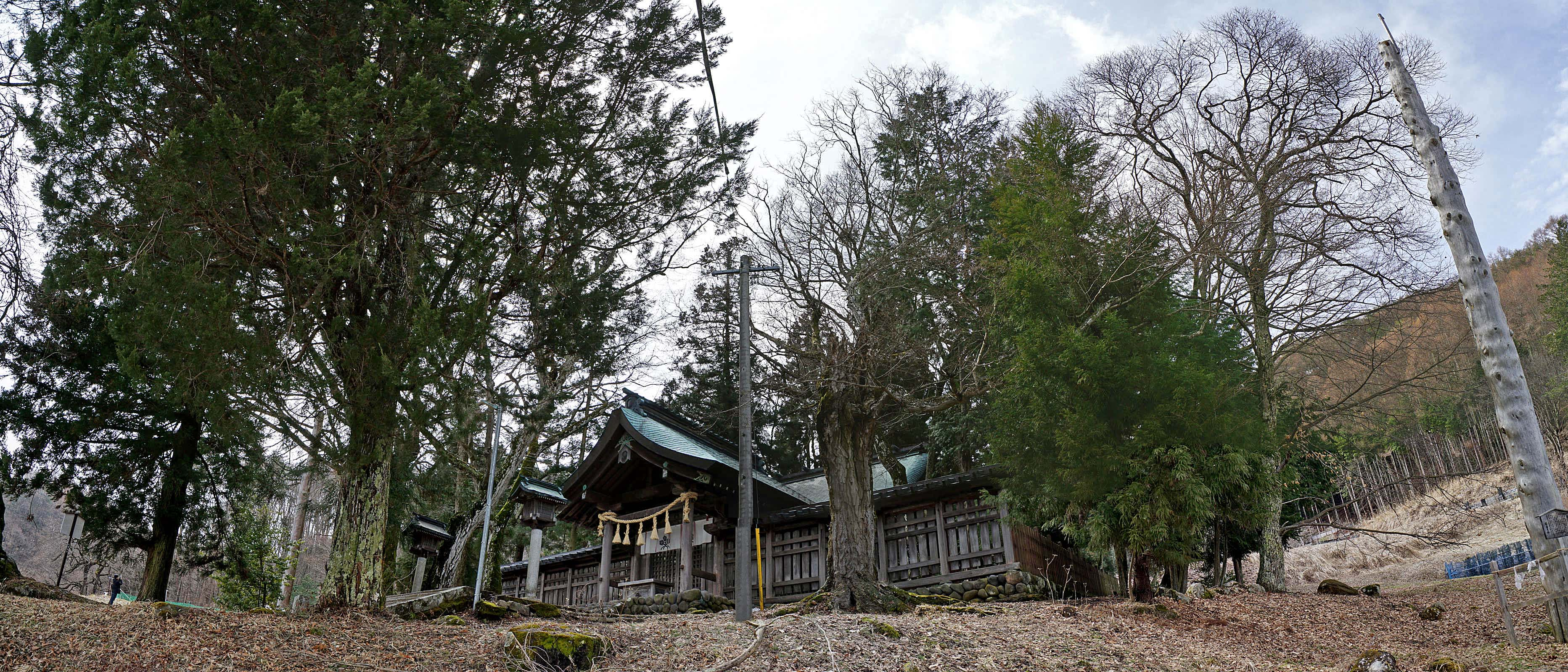 Suwa taisha Kamisha Maemiya , 諏訪大社 上社 前宮